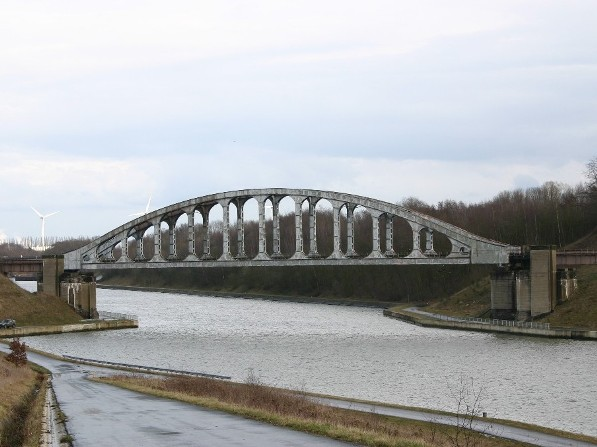 Vierendeelbréck_zu_Gelik.